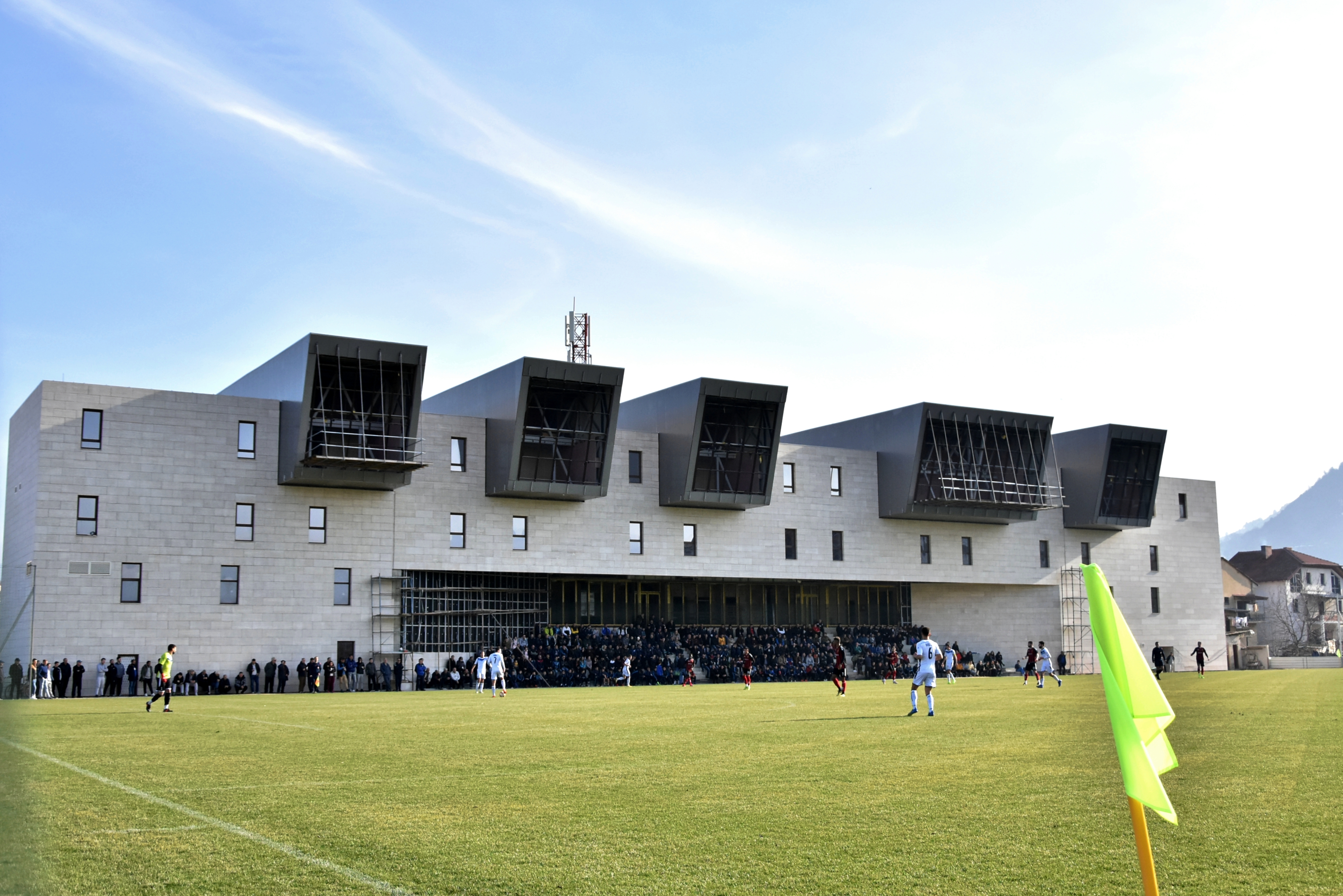 Поглед од фудбалскиот терен кон фасадата на Спортскиот центар кој го гради струмичкиот калчолигаш Горан Пандев. Фотографијата е направена на контролен натпревар на ФК Академија Пандев со најтрофејниот македонски клуб Вардар, на кој домаќините славеа со 6:1. Натпреварот се одигра во две полувремиња од по 60 минути. За време на натпреварот центарот сè уште не беше довршен, но на публиката, која броеше околу 300 души, ѝ беше овозможено да ја следи играта од единствената трибина.